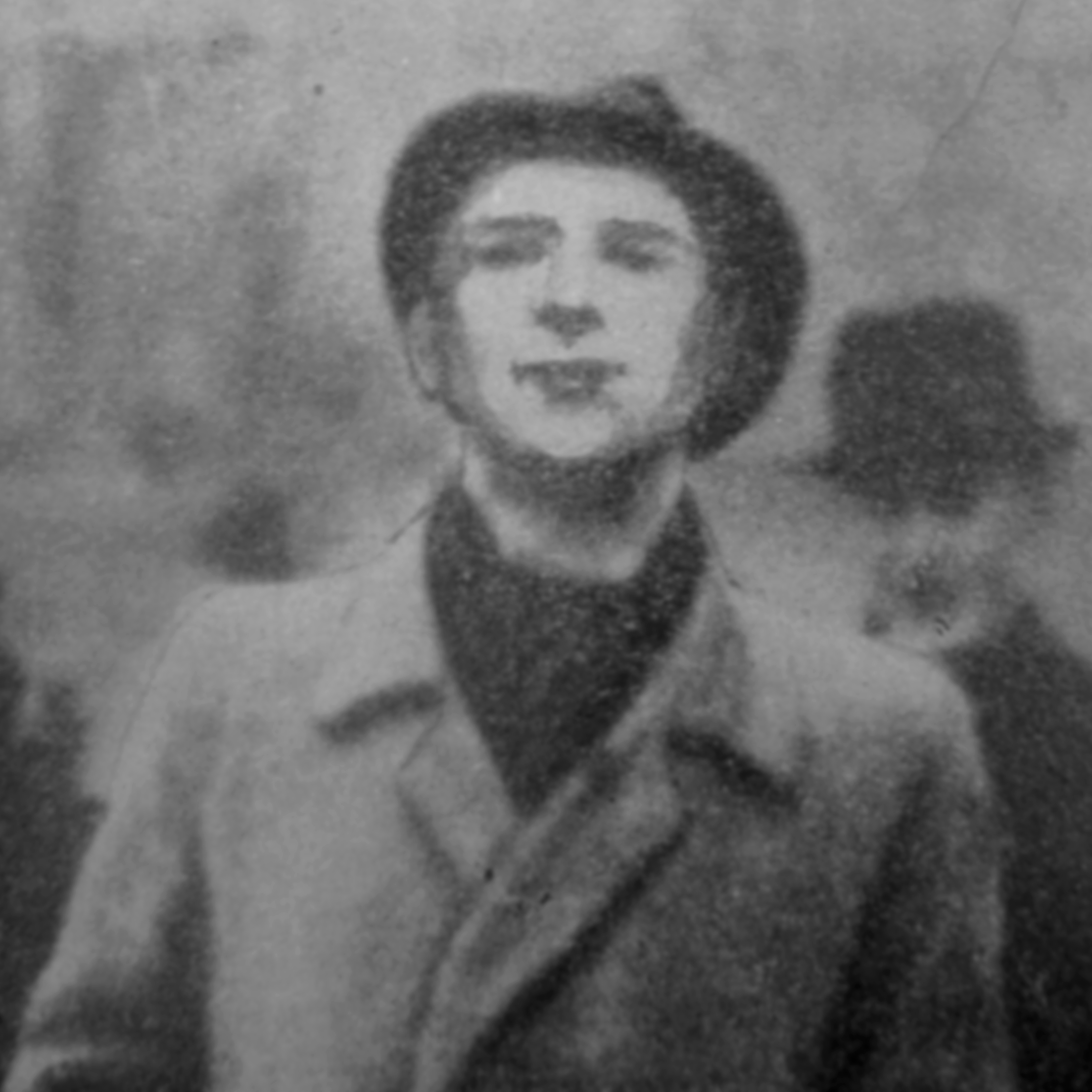 Józef Ryszka ps. „Szczepon”, „Gizd” (ur. 14 lutego 1920 w Katowicach-Szopienicach, zm. 17 listopada 1943 w Warszawie) – polski poeta, działacz podziemia niepodległościowego podczas okupacji niemieckiej (w Departamencie Informacji i Propagandy Delegatury RP – Sekcji Zachodniej).